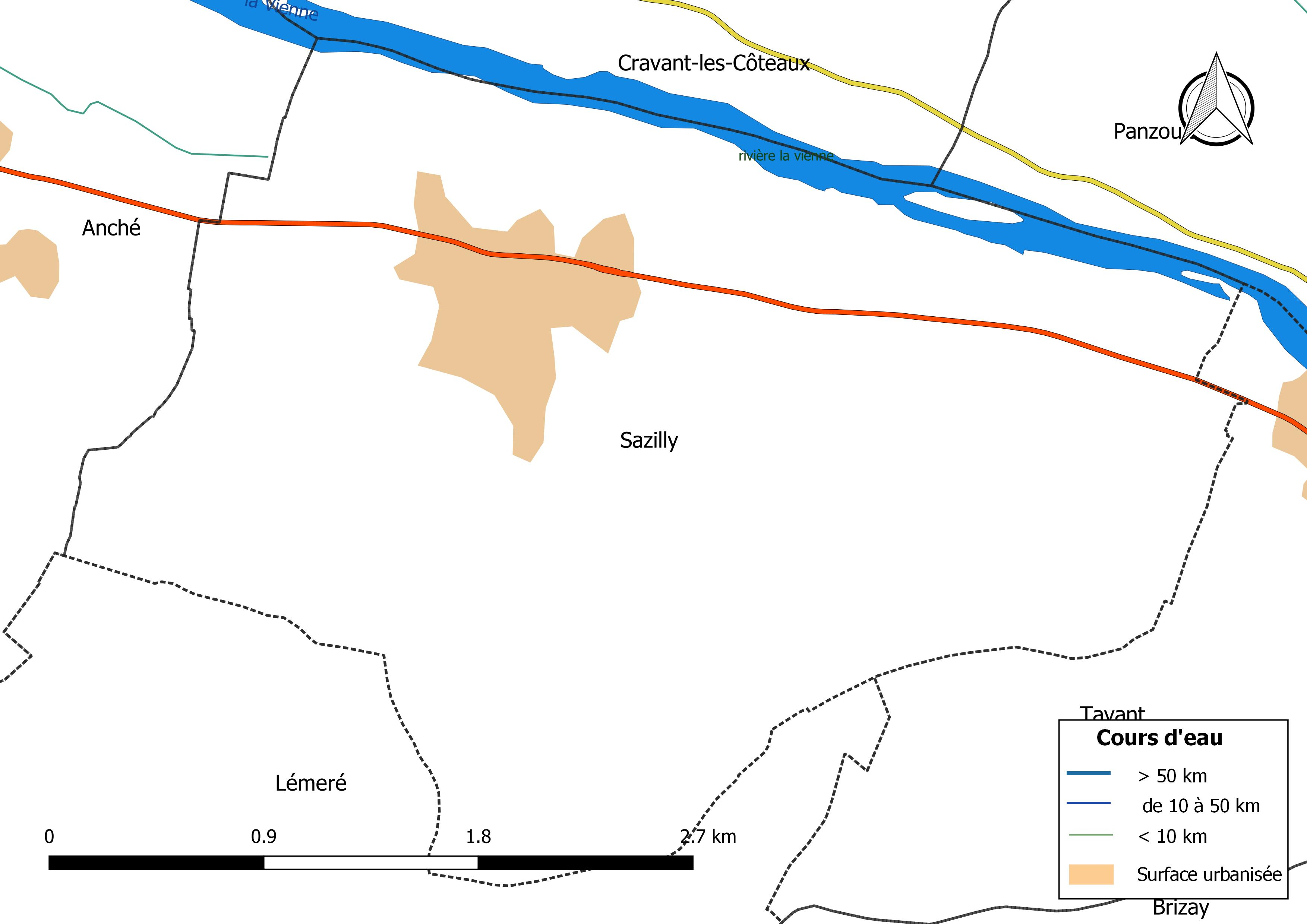 Carte du réseau hydrographique de la commune de Sazilly (France).